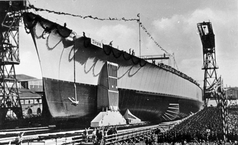 Schlachtschiff "Tirpitz", Stapellauf Wilhelmshaven - Stapellauf des Schlachtschiffes "Tirpitz"